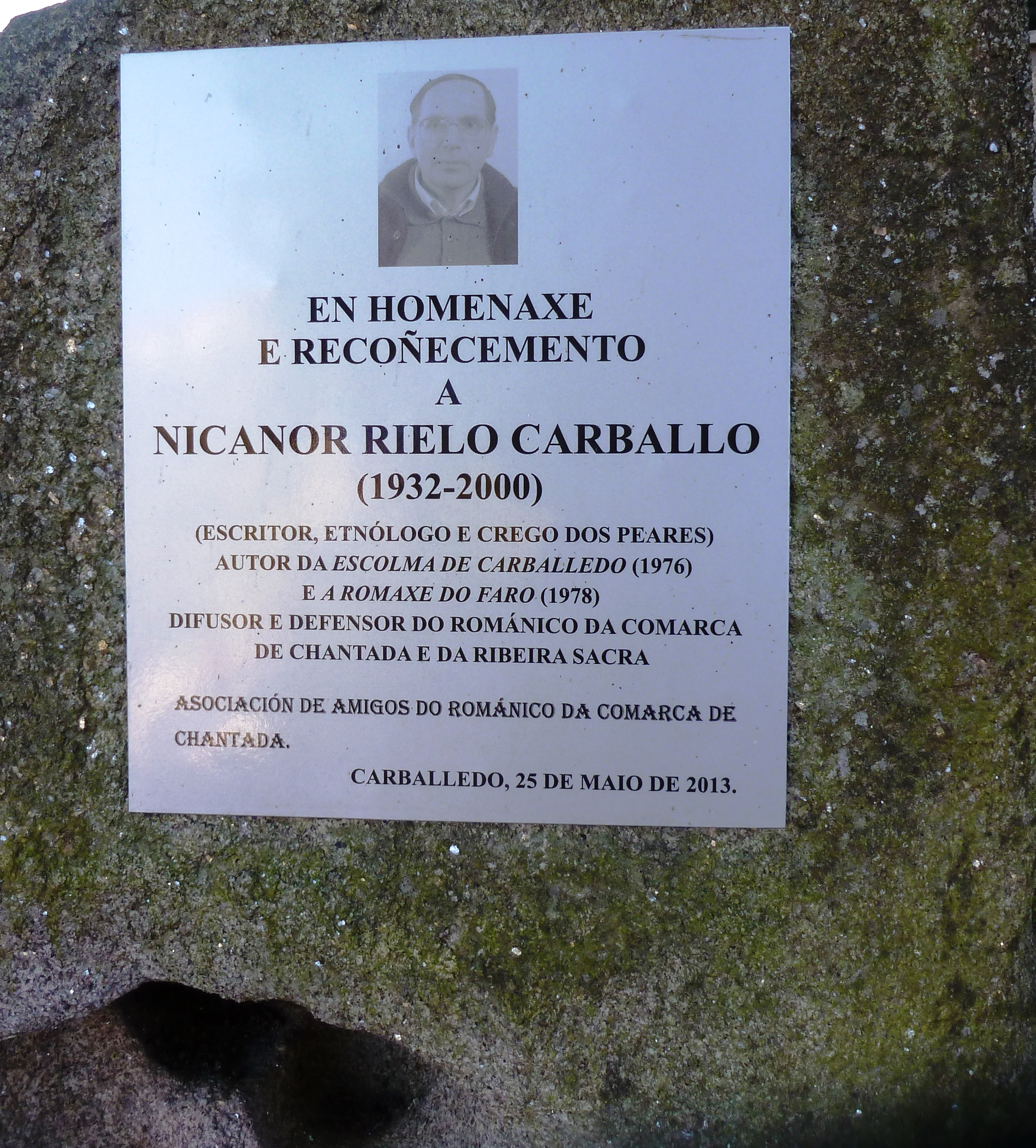 Placa homenaxe a Nicanor Rielo Carballo, Castro, Carballedo